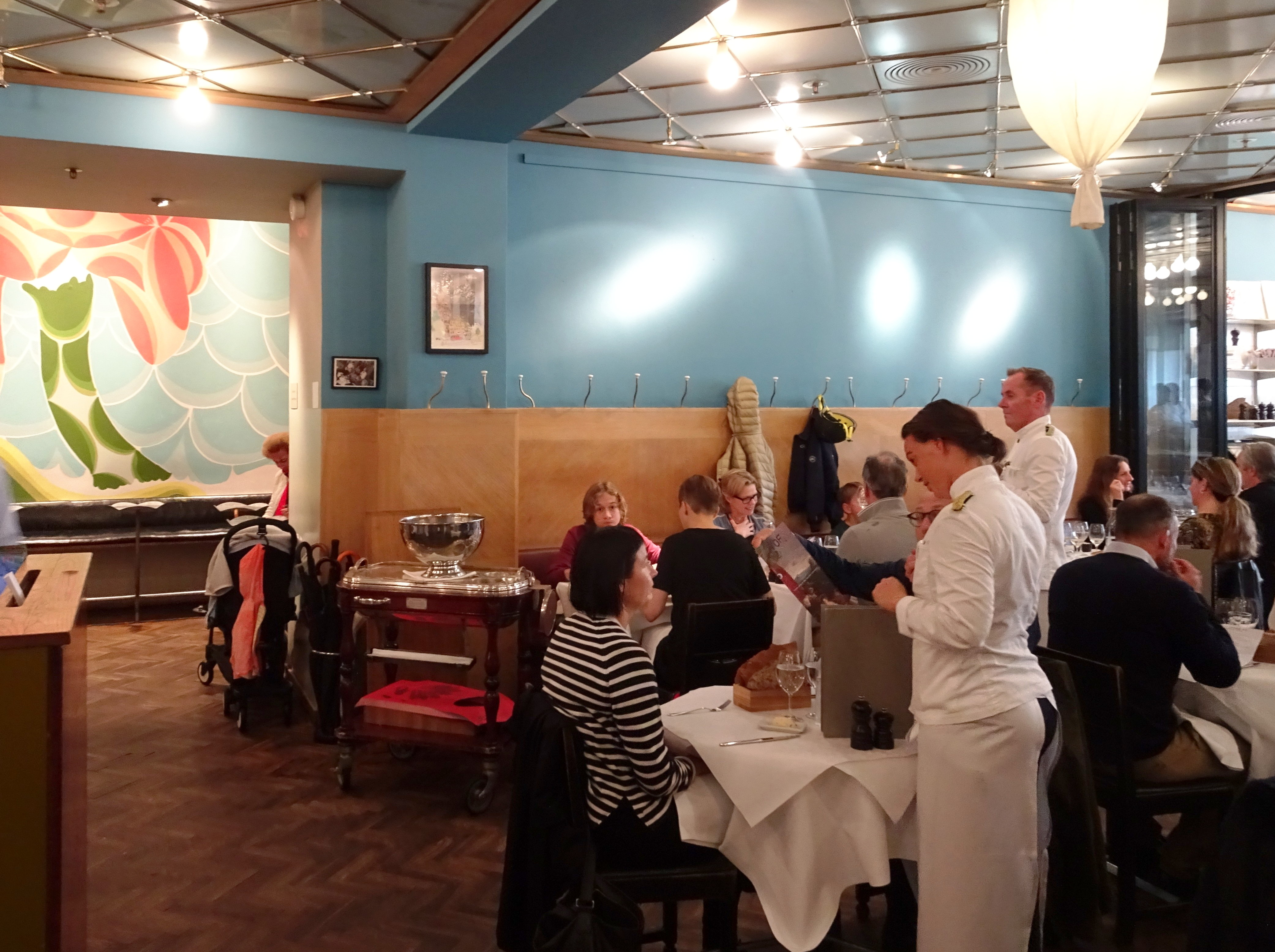 Restaurang Sturehof, Stureplan 2-4